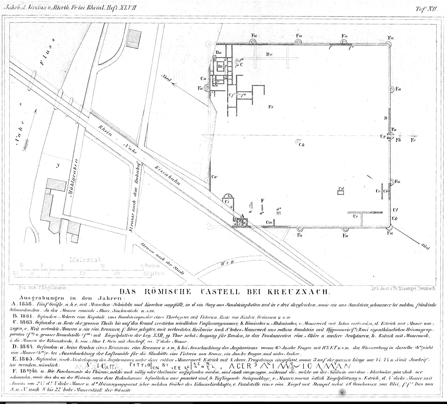 Befundplan der Ausgrabungen am spätrömischen Kastell Kreuznach (Cruciniacum?), Deutschland/Rheinland Pfalz, 1858-1866.